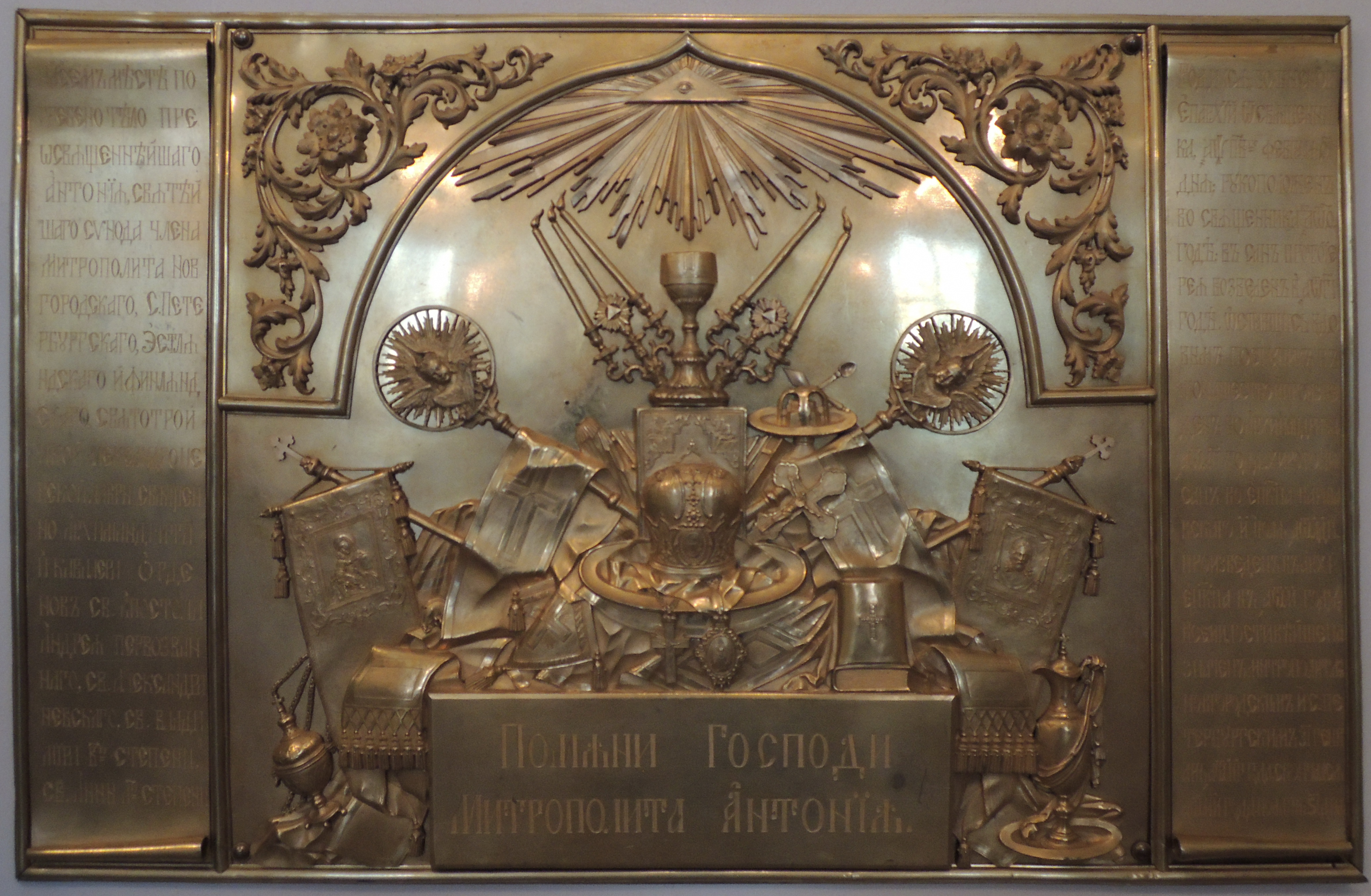 Благовещенская церковь Александро-Невской Лавры. Антоний (Рафальский) 19.02.1782-16.11.1848, митрополит Петербургский и Новгородский в 1843-1848 гг. Россия. Санкт-Петербург. Благовещенская усыпальница. Доска с эпитафией. Мастер А.Е. Шумилов, 1848 г. Медь золоченая, 67X106. Настенная доска с рельефной композицией из архиерейских и богослужебных атрибутов. Слева и справа от рельефа свитки с гравированными надписями: На семь мъстъ по / гребено тъло пре / освященнъйшаго / Антон/я, святъй /шаго синода члена, /Митрополита Нов/городскаго, С. Пете/рбургскаго, Эстля / ндскаго и Финлянд / скаго, святотрои / цкой Александроне / вской лавры священ / ноархимандрита / и кавалера Орденов св. апостола/Андрея первозван / наго, св. Александра / невскаго, св. Влади / мiра [2й] степени, / св. Анны [4й] степени. РодилсА, Волынской / епархiи [от] священни / ка, [1782] го февраля [19] / днъ рукоположенъ / во священника [1809] годъ въ санъ npoтоie / рея возведен в [1813] годъ. (Оставшись вдо / вымъ, поступилъ въ / монашество и произве / день во архимандрита [1833] года, хиротони / санъ во [епископа] Варша / вскаго [8 ]июлА [1834], / произведенъ въ apxi- / [епископа] въ [1840] году; / Всемилостивъiше на / значенъ митрополитомъ / Новгородскимъ и С. Петербургскимъ [17] ген /варя [1843] года. Скончался/[1848] года ноября [16] дня. Под рельефом на пластине гравированная надпись: Помъни Господи / Митрополита Антонiя. Памятник изготовлен в мастерской гробовых дел мастера, петербургского купца Автонома Егоровича Шумилова. Доска поступила в музей в 1930-е г.г из Духовской церкви. День рождения 19 февраля (по старому стилю). День памяти 16 ноября (по старому стилю).